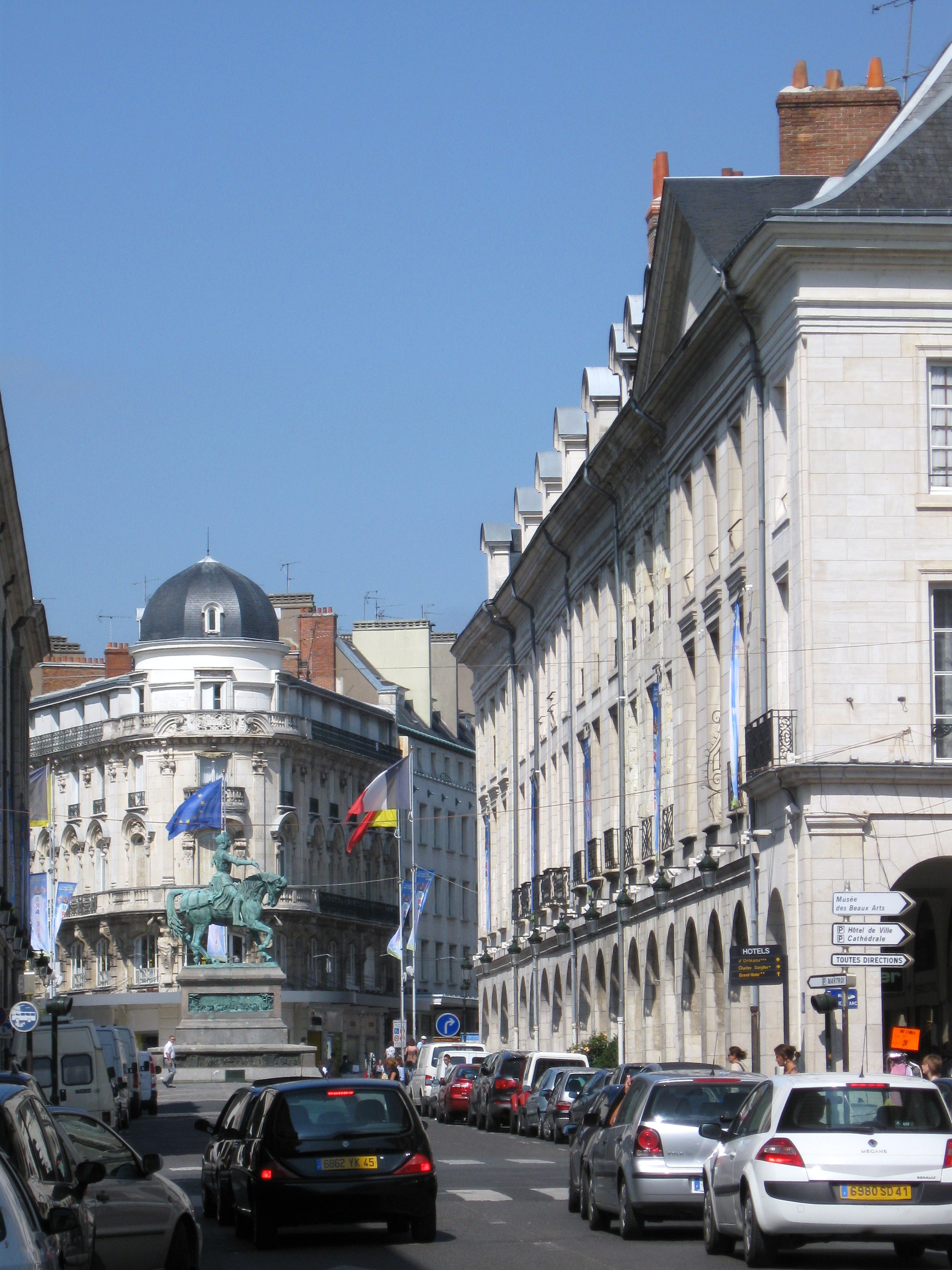 Rue Royale, Orléans, Loiret, France